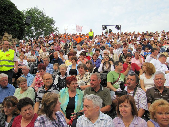 Tribuna z gledalci na festivalu.